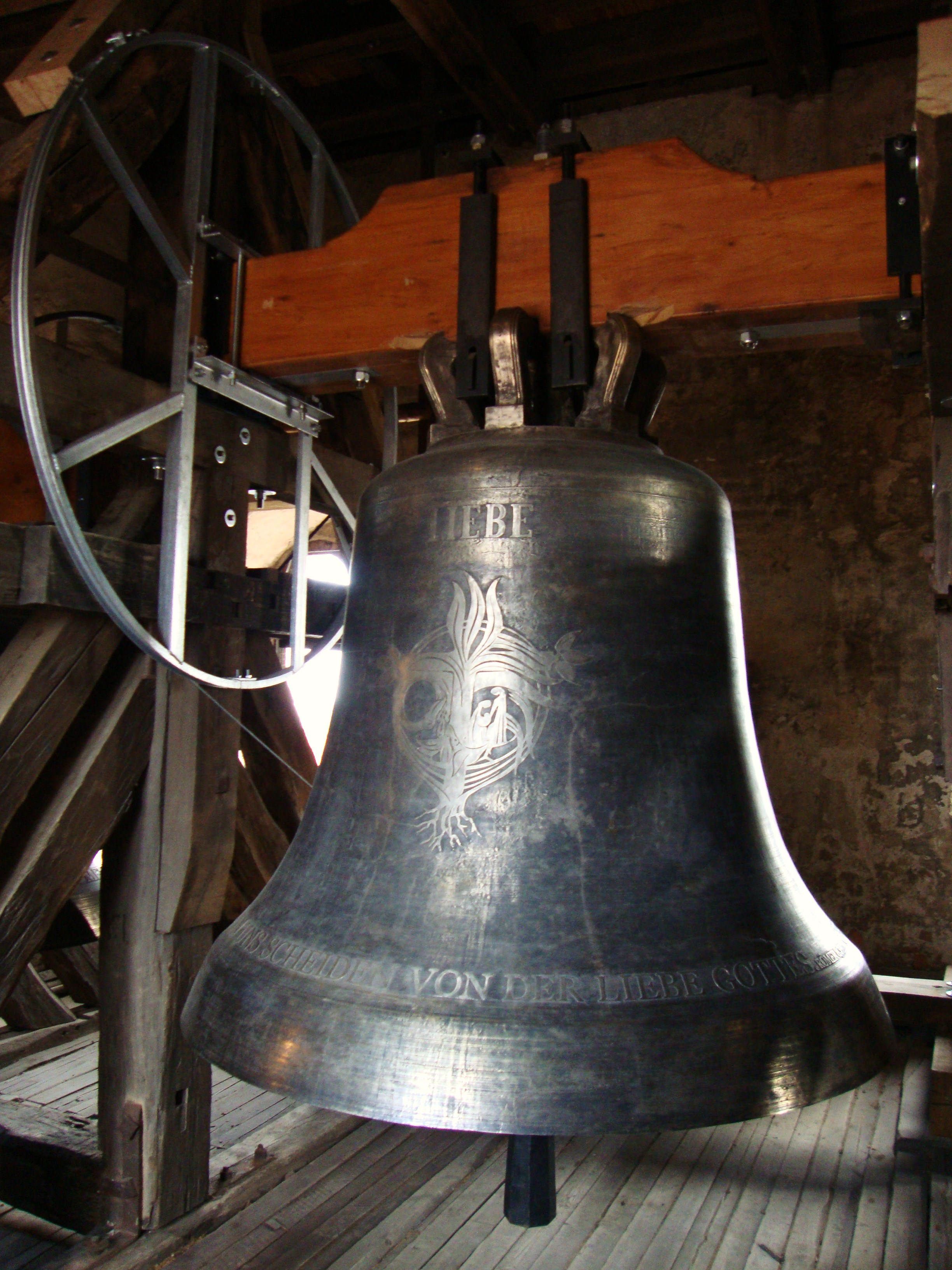 Große Glocke Liebe von 2009 (a0) in St. Pankratius zu Burgdorf (b. Hannover)